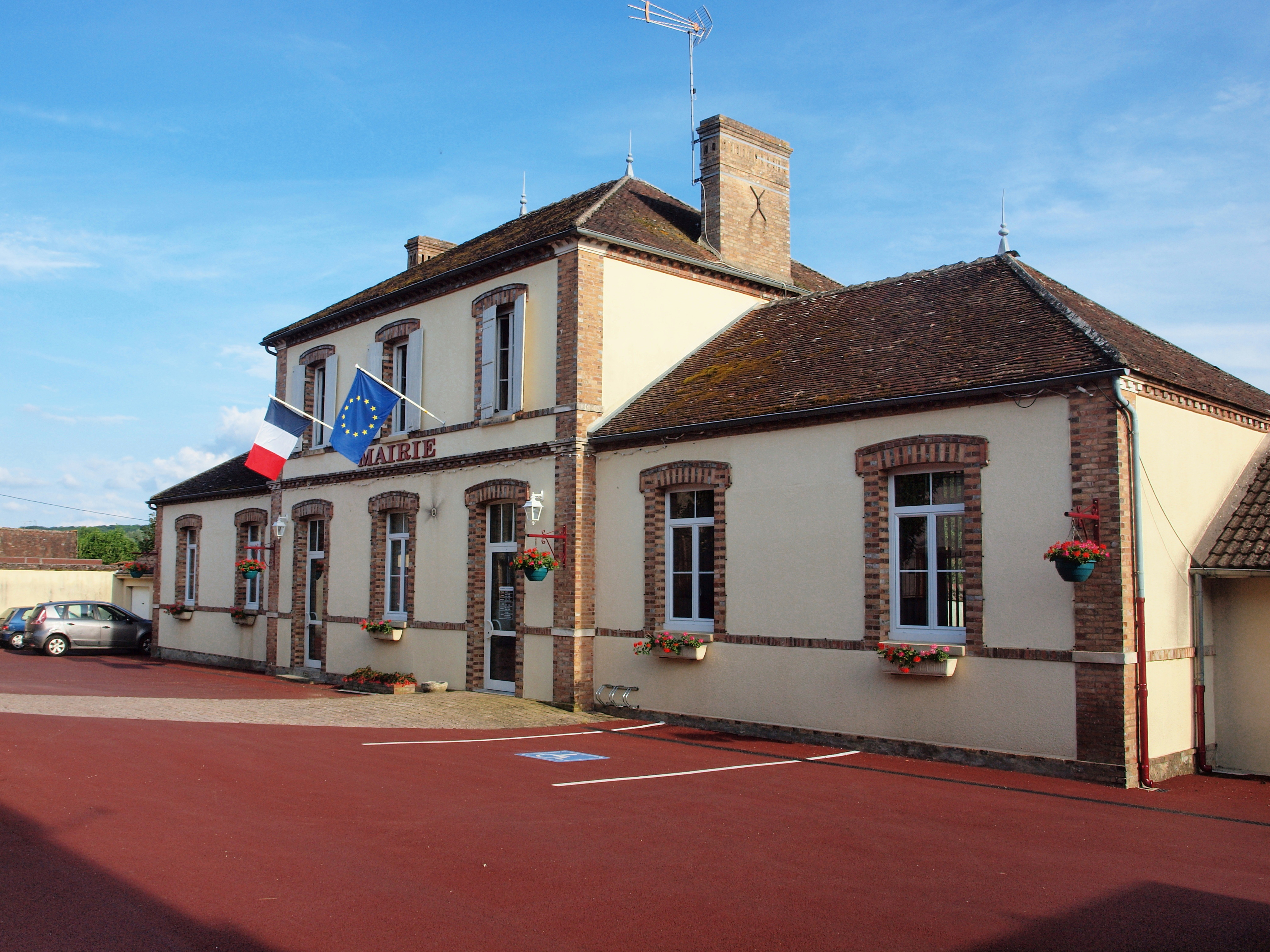 Mairie de Nailly (Yonne, France)